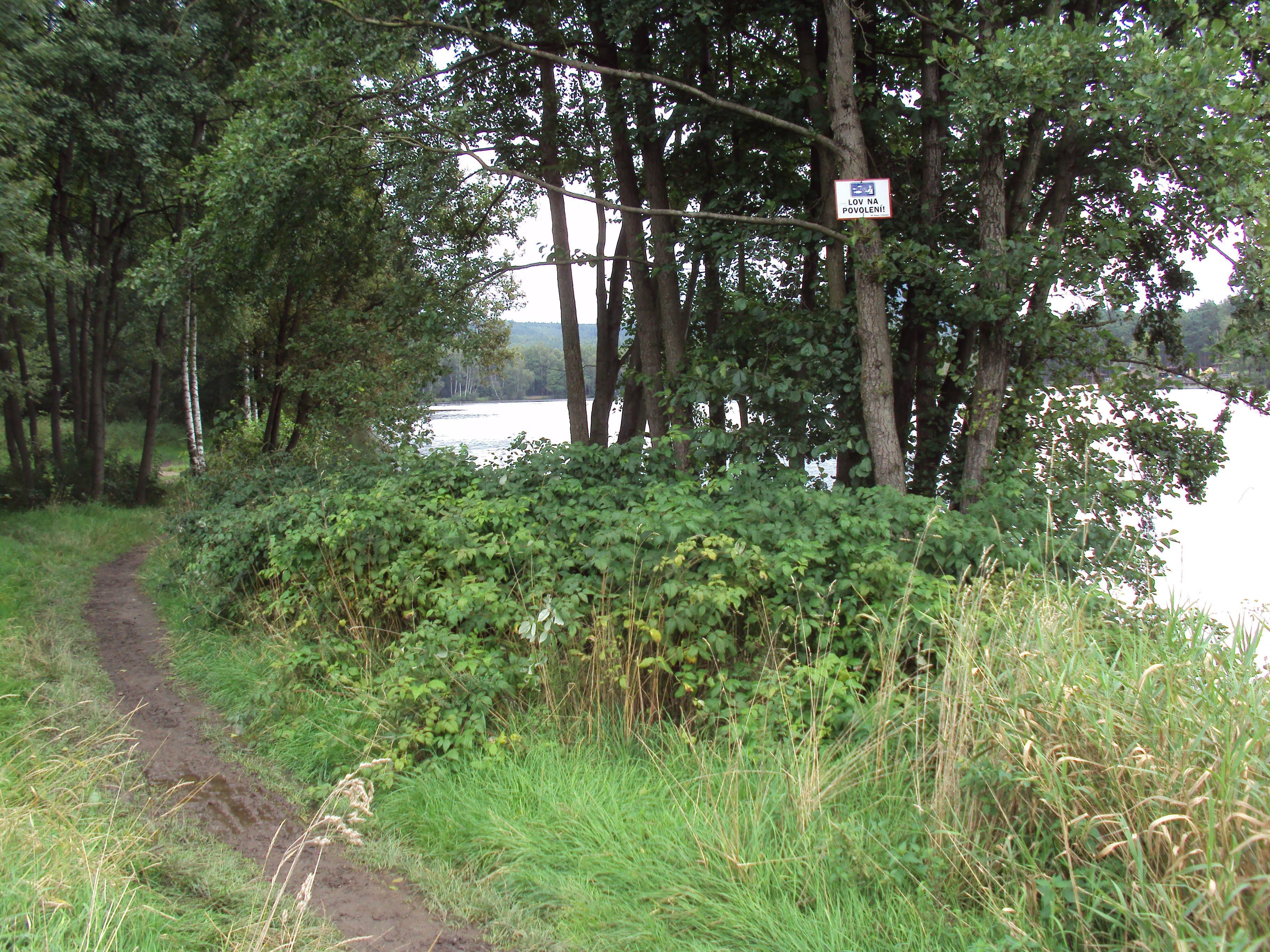 Radvanecký rybník ze strany od Radvance, z druhé je na něm Koupaliště Sloup